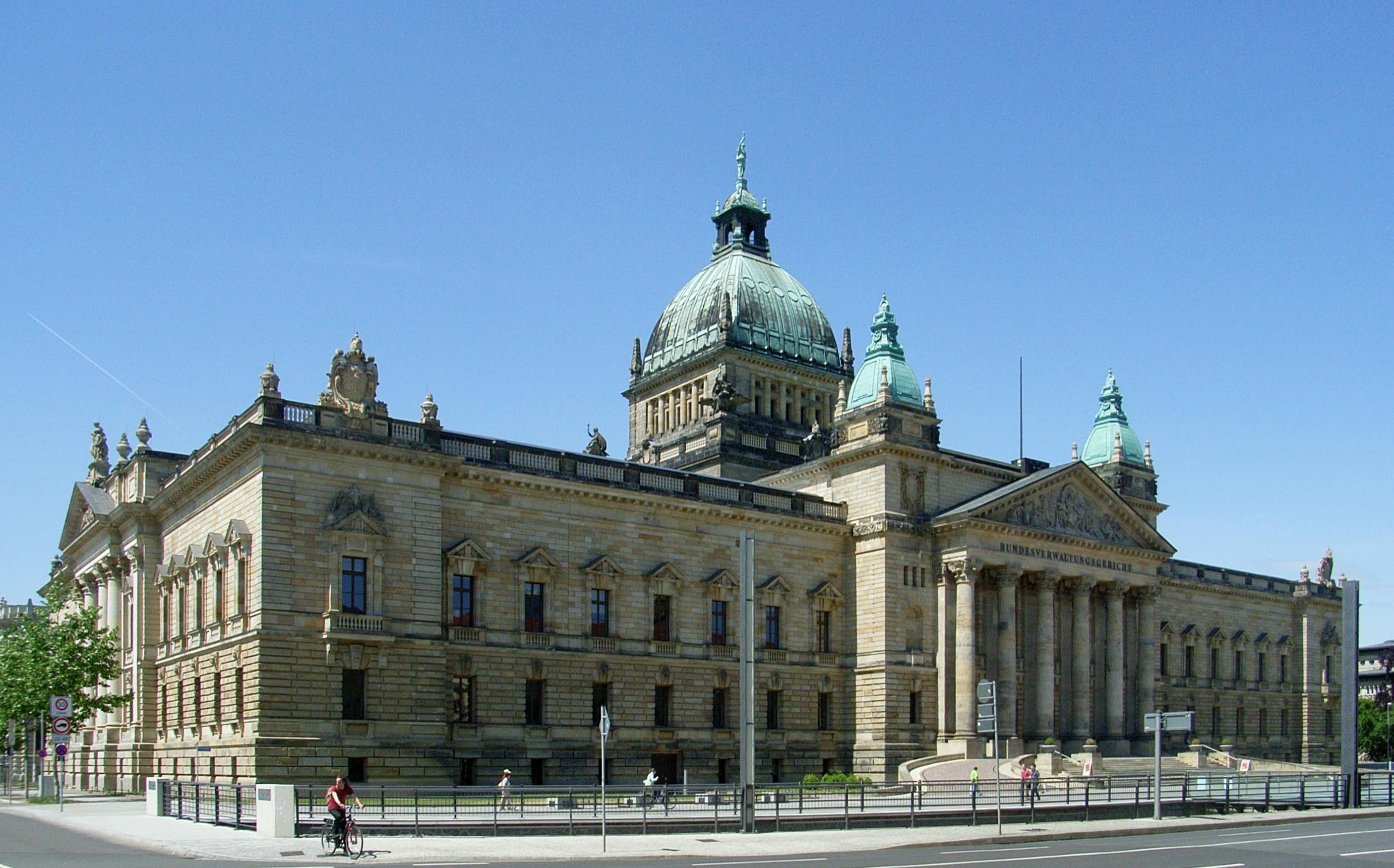 Dieses Bild zeigt das Bundesverwaltungsgericht in Leipzig.